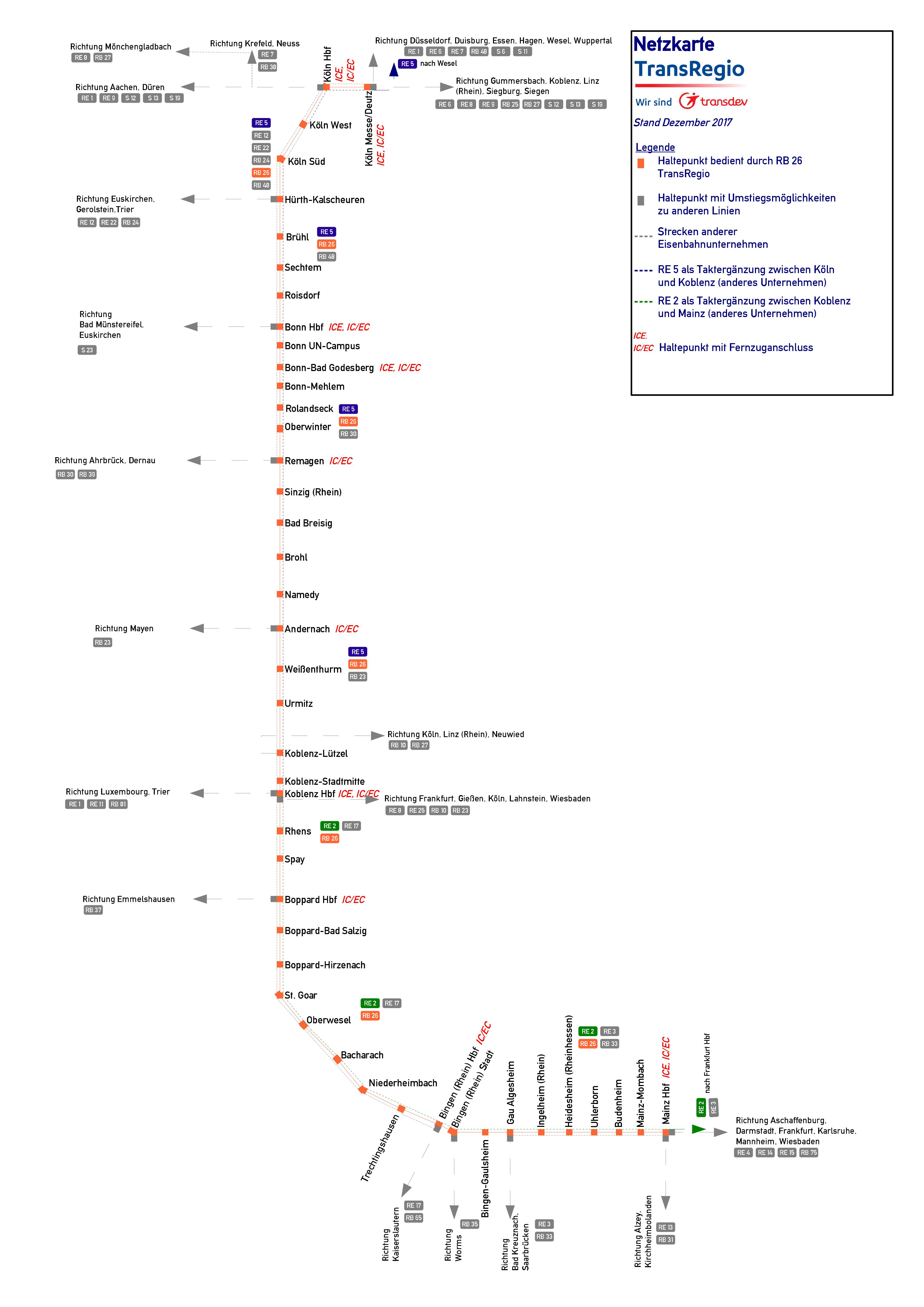 Netzkarte der TransRegio nach Stand von Dezmeber 2017